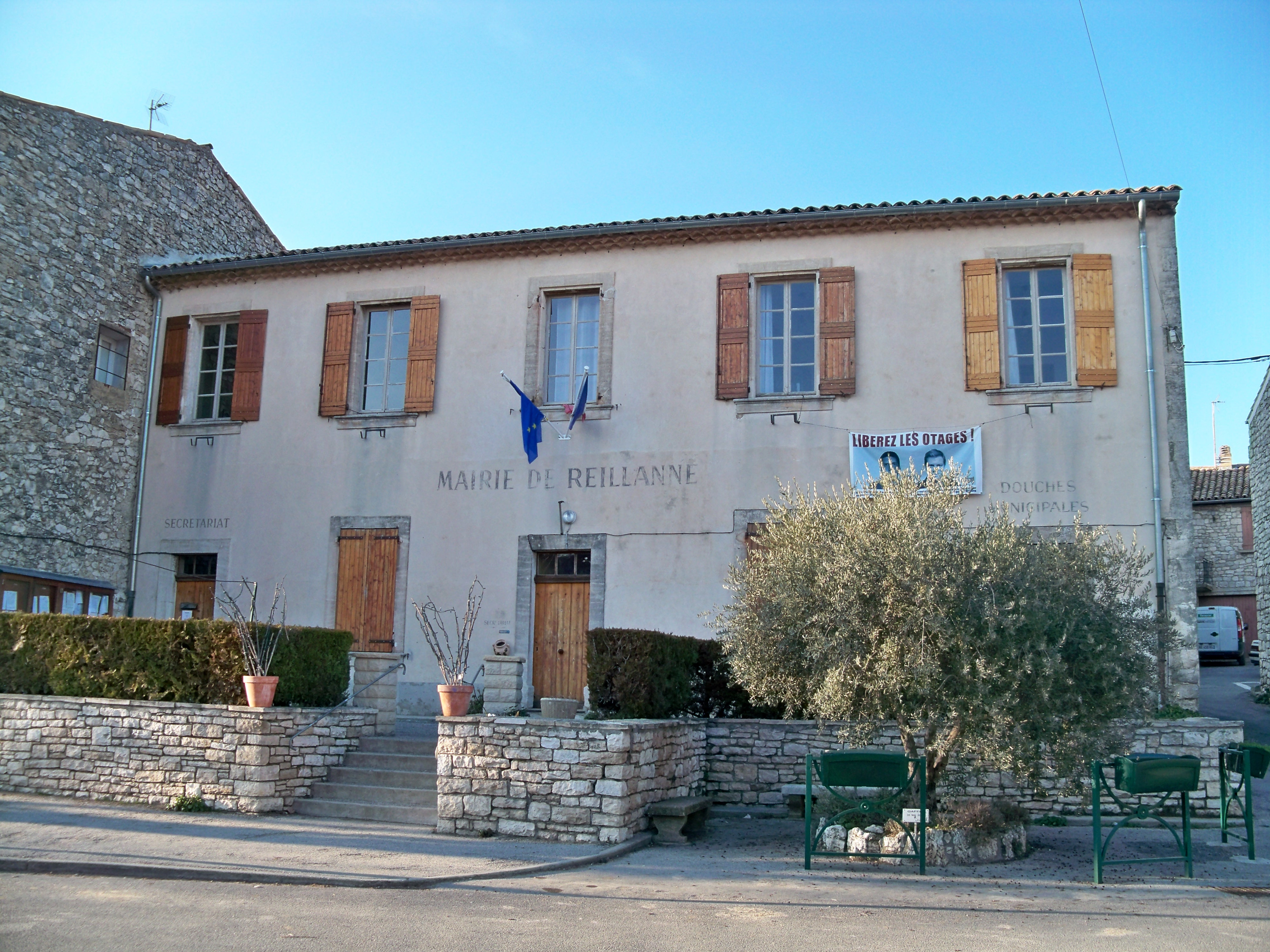 Mairie de Reillanne (04), France